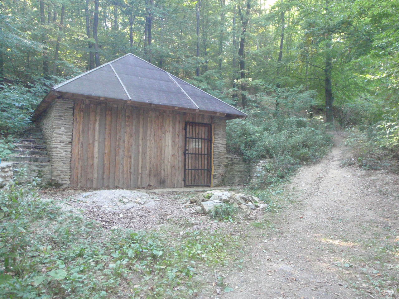 Gyepű II - Szálasi Bunker Kőszegi-hegységben. épült 1944. november és 1945. eleje között.